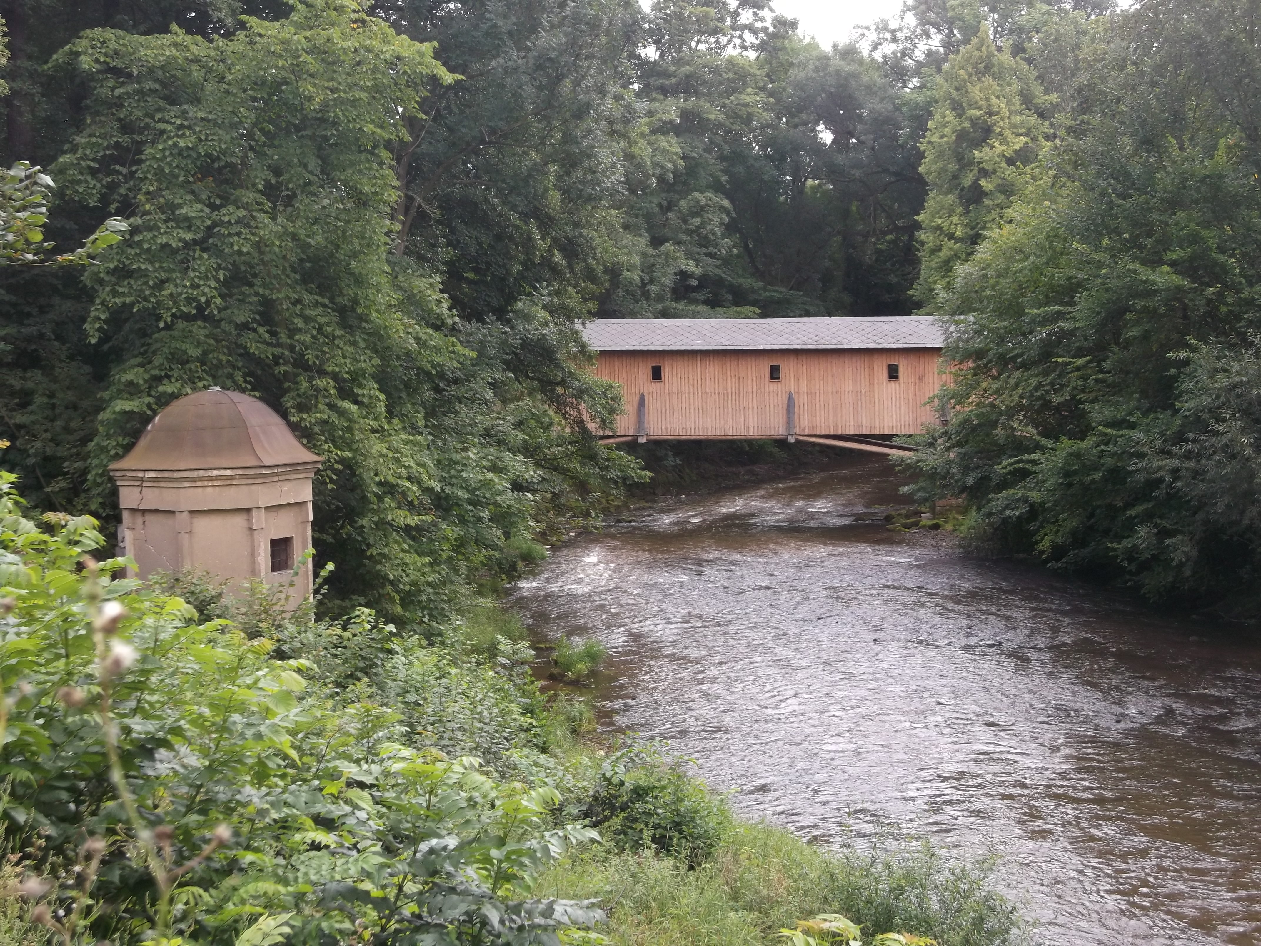 Lávka - dřevěný most, jihovýchodní část obce, Verdek.